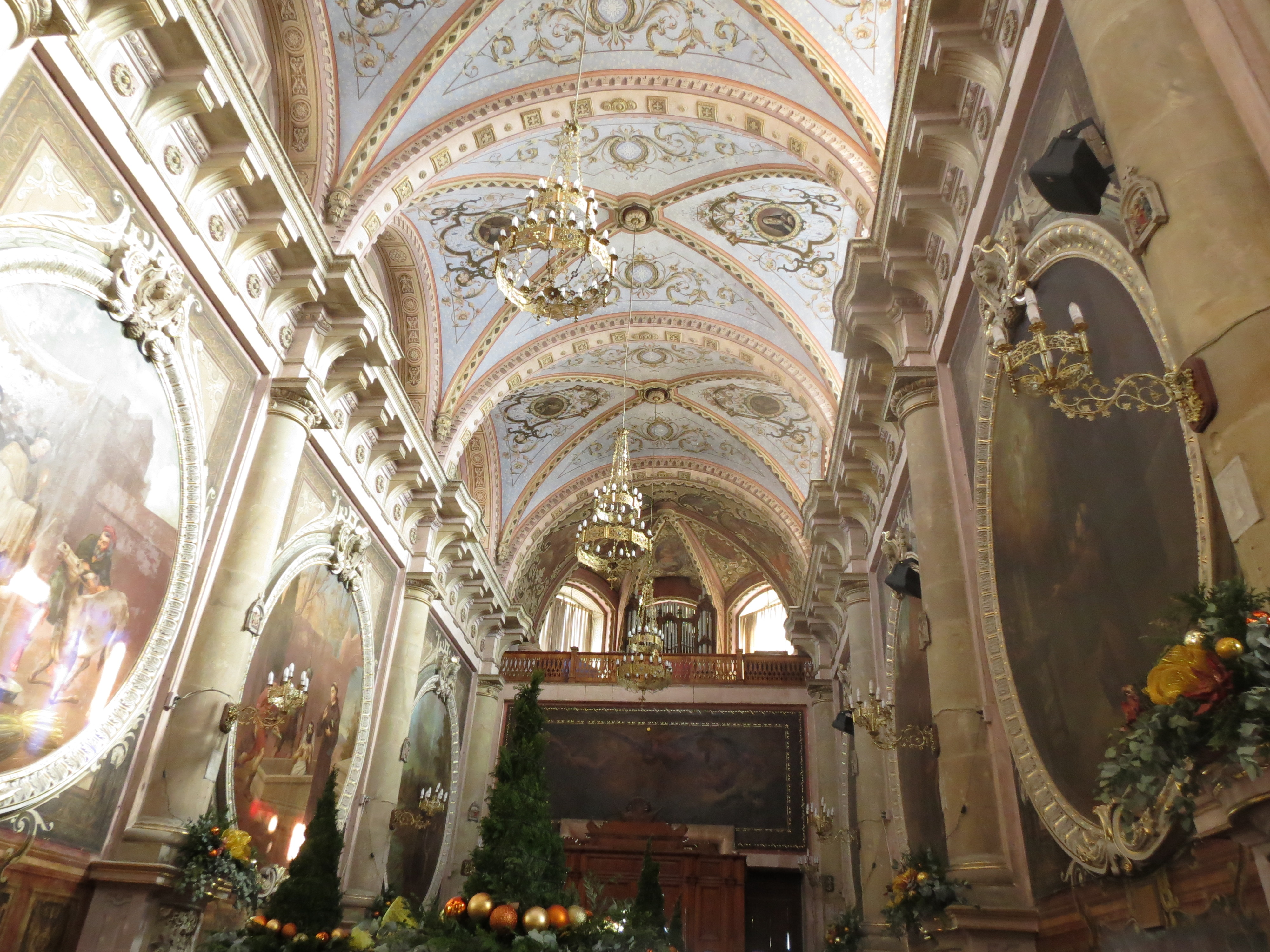 Interior del Templo de San Antonio, con pinturas de Candelario Rivas, Aguascalientes